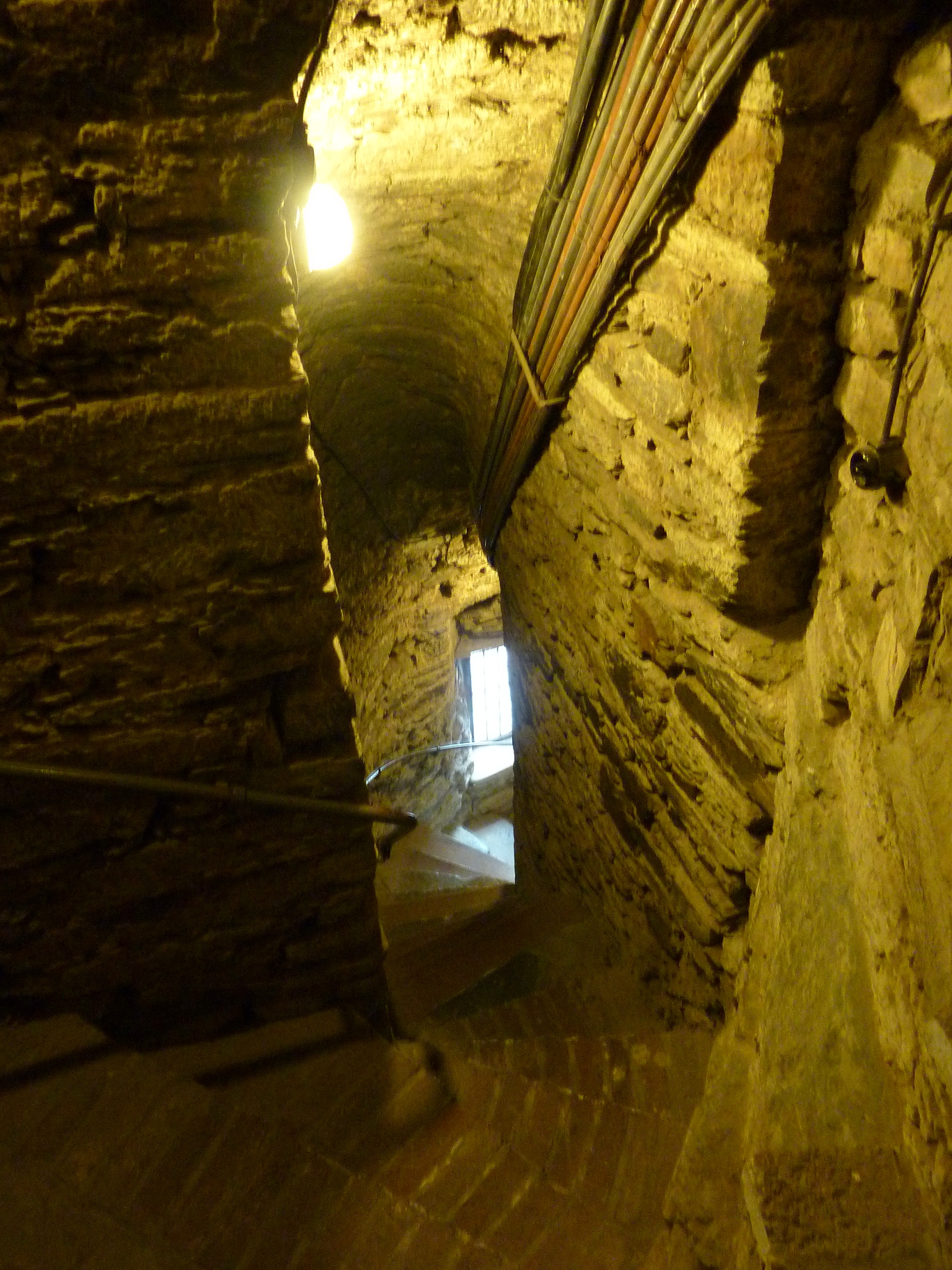 Evangelische Nikolaikirche in Siegen/Westfalen: Treppe im Turmaufgang, Blickrichtung treppabwärts